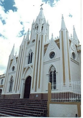 Capilla Asilo San Antonio de Málaga, Santander, Colombia